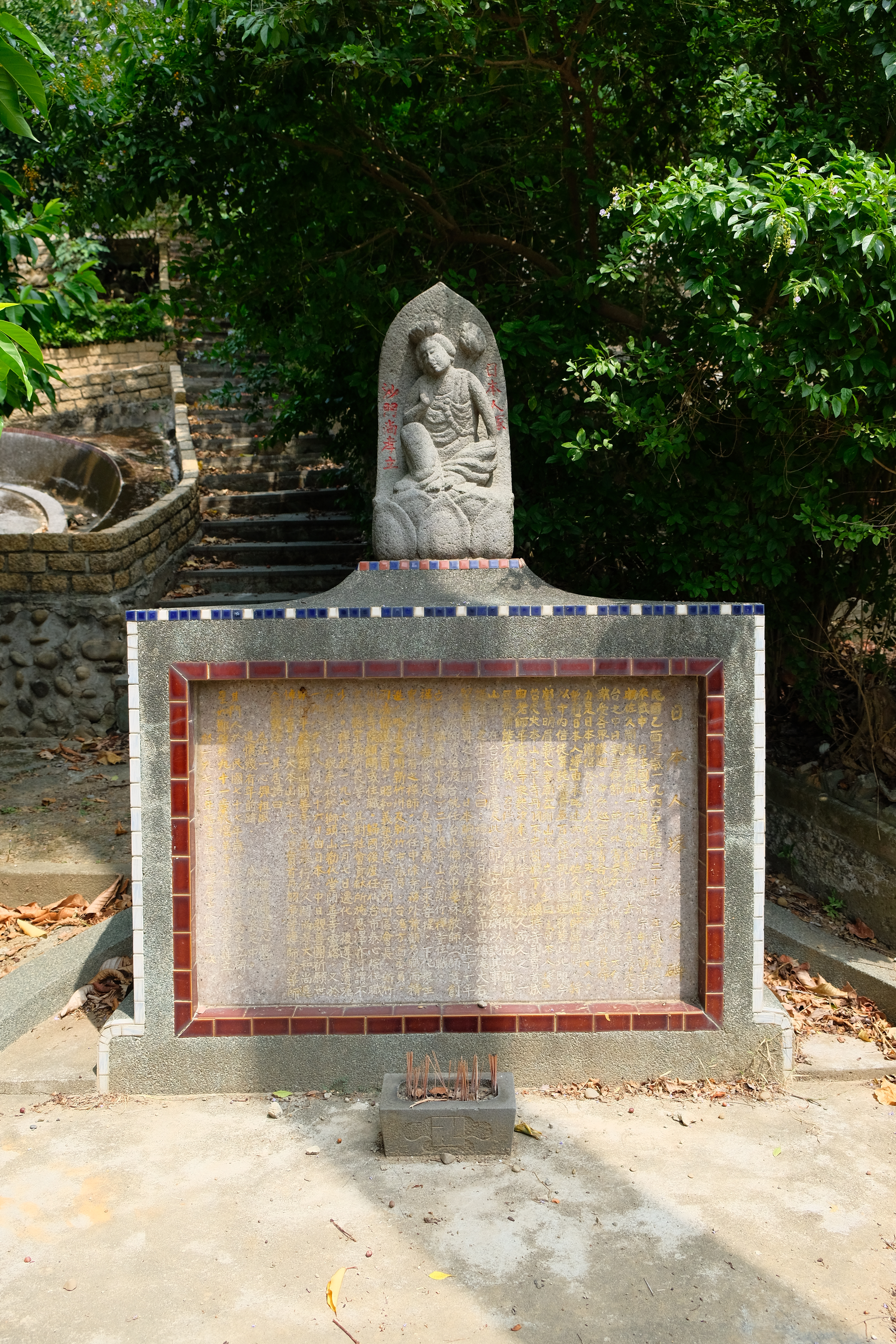 2018 New Dazhong Temple 新竹市明湖路新大眾廟日本人塚